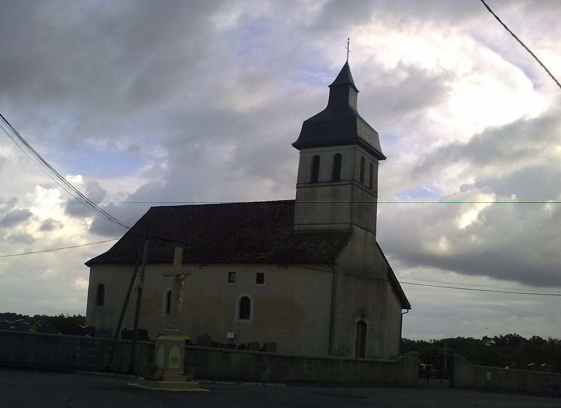 Castillon (Canton d'Arthez-de-Béarn)